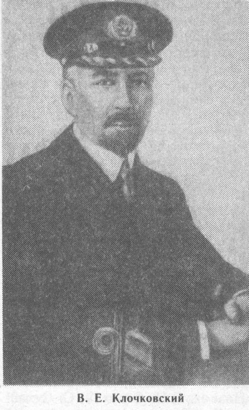 Контр-адмирал Клочковский Вячеслав Евгеньевич (снимок польского периода)